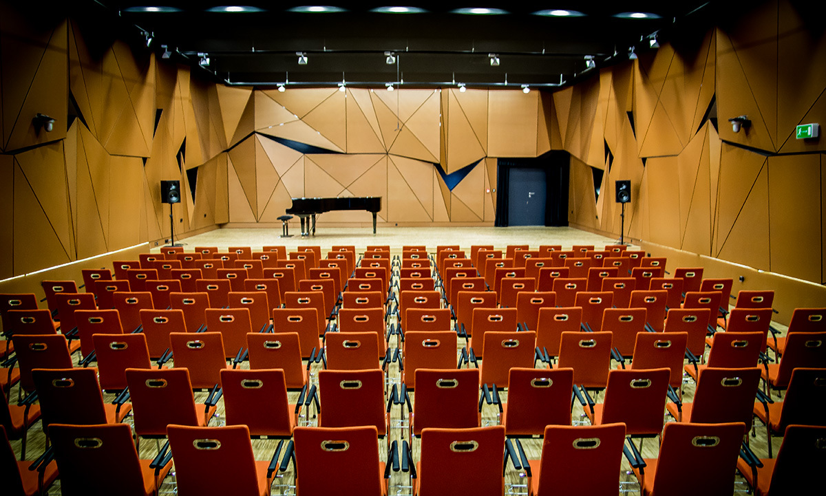 Liszt Ferenc Hangversenyterem, Pécsi Tudományegyetem, Művészeti Kar, Zeneművészeti Intézet / Liszt Ferenc Concert Hall, University of Pécs, Faculty of Music and Visual Arts, Institute of Music, Hungary